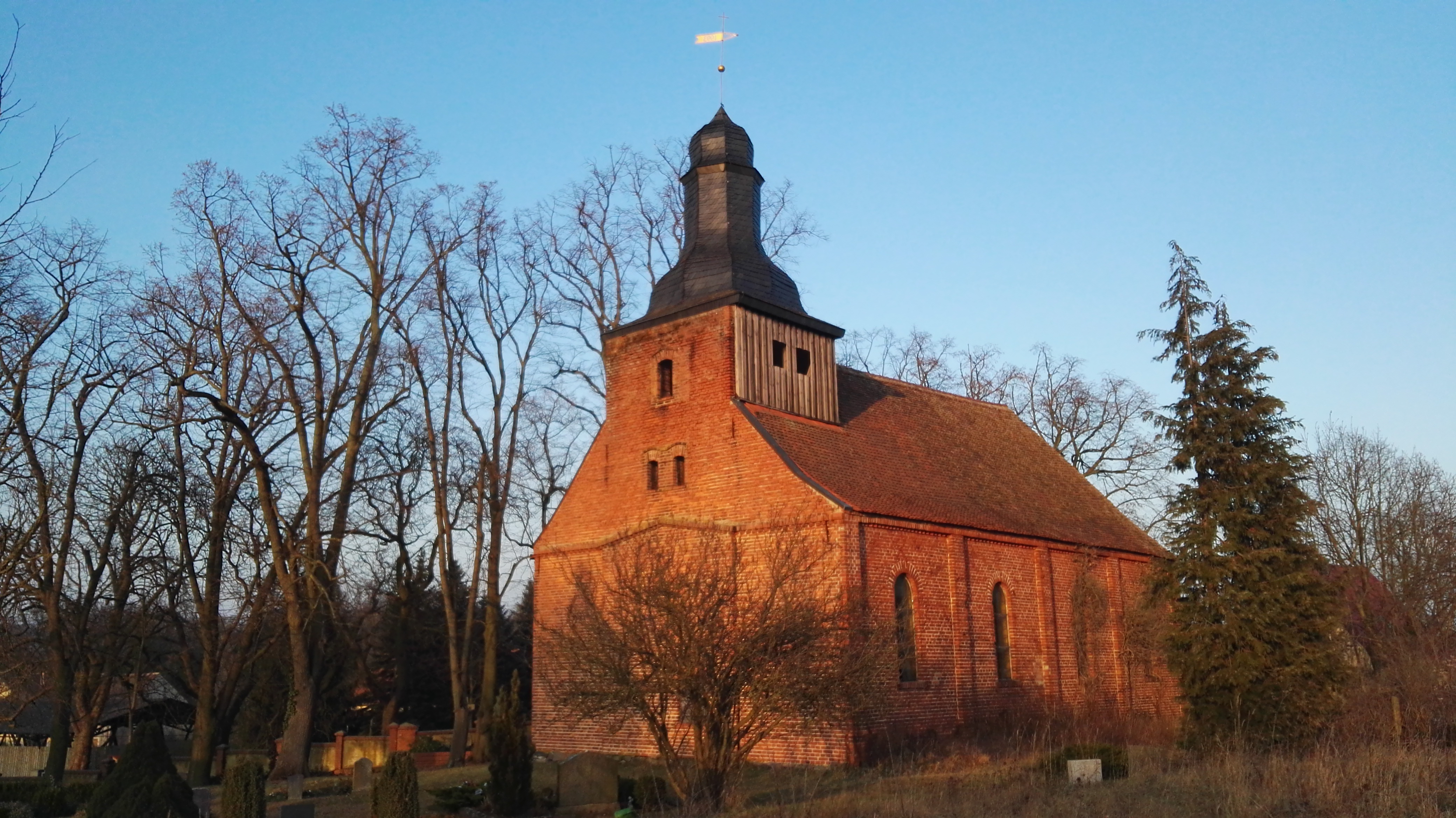 Denkmalgeschützte Kirche in Landin, Ortsteil der Gemeinde Kotzen in Brandenburg